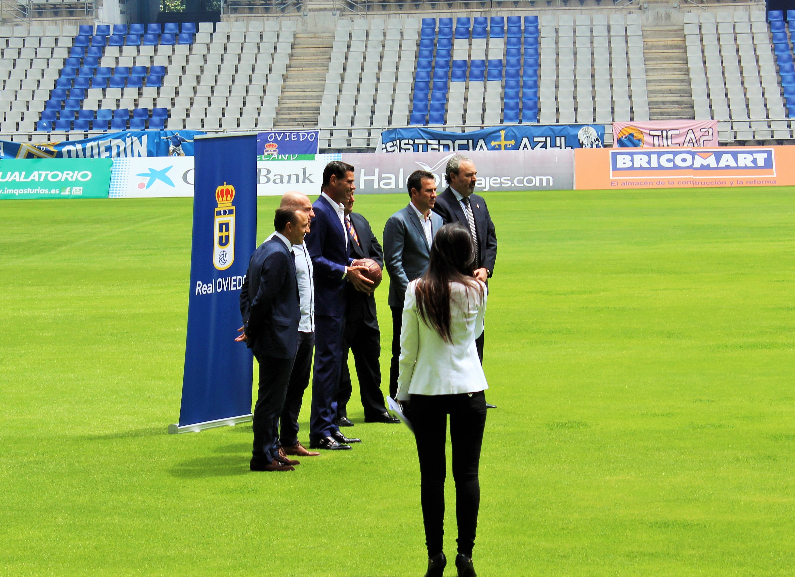 Presentación de Fernando Hierro como entrenador del Real Oviedo.